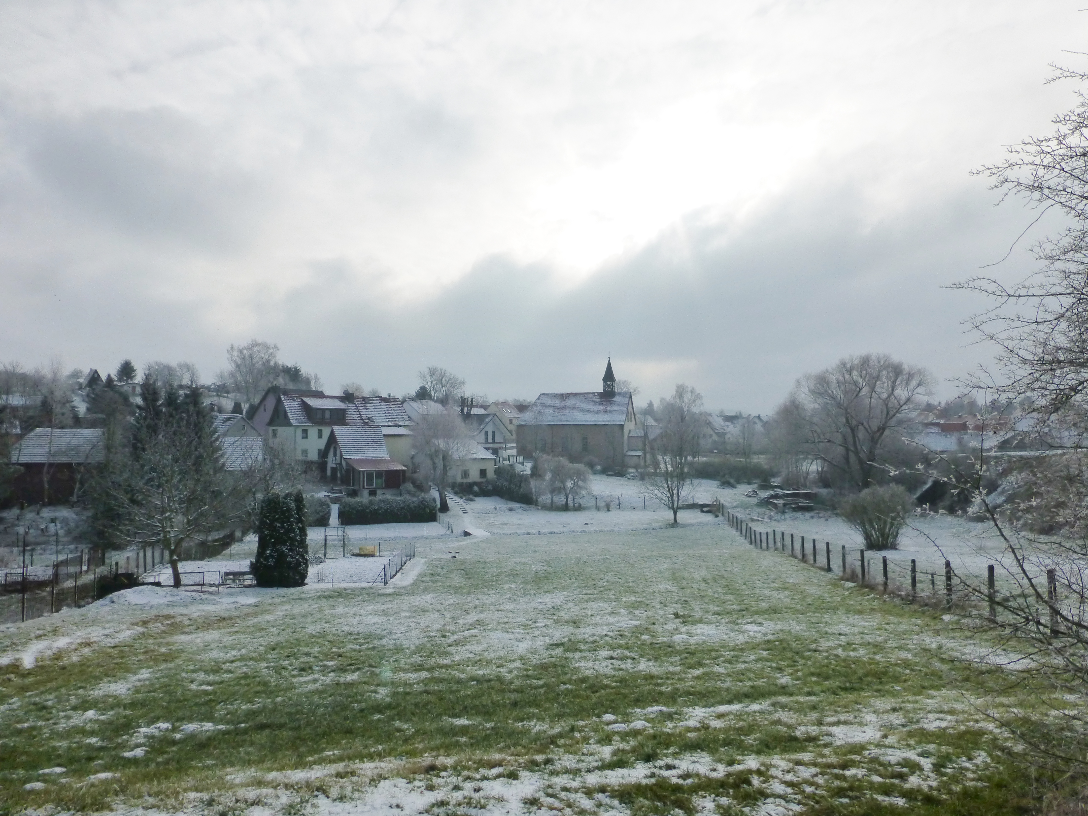 Blick auf Hausen